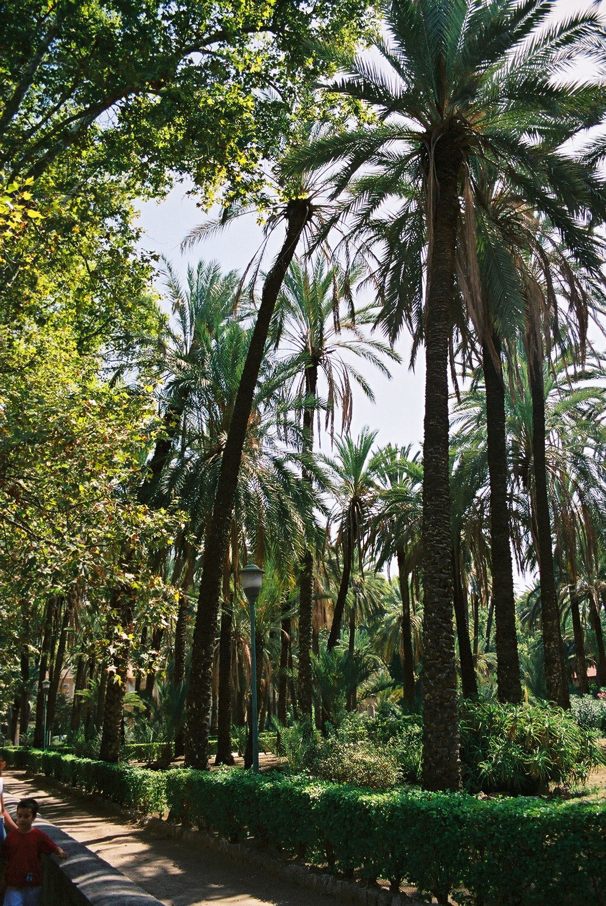 Piazza Vittoria, Palermo Palm garden of Villa Bonanno